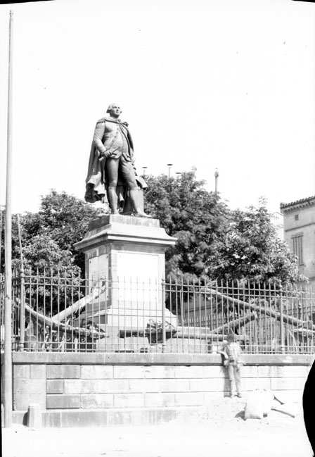 Fonds Trutat - Photographie ancienne Cote : TRU C 815 Localisation : Fonds ancien (S 30) Original non communicable Titre : Statue de Lapérouse, Albi, 8 juillet 1899 Auteur : Trutat, Eugène Rôle de l’auteur : Photographe Lieu de création : Albi (Tarn) Date de création : 1899 Mesures : : 13 x 9 cm Observations : Notes de la main de E. Trutat : "Obj Goerz, pl. rouge 12' " Plaque cassée Mot(s)-clé(s) : -- Statue -- Socle -- Cape -- Arbre -- Muret -- Grille -- Homme -- Eté -- Architecture commémorative, votive, funéraire -- Maison -- Canon -- Ancre -- Albi (Tarn) -- Albi (Tarn ; canton) -- Midi-Pyrénées (France) -- Statue de Lapérouse (Albi) -- 19e siècle, 4e quart Médium : Photographies -- Négatifs sur plaque de verre -- Noir et blanc -- Goerz -- Vues d'architecture Bibliothèque de Toulouse. Domaine public